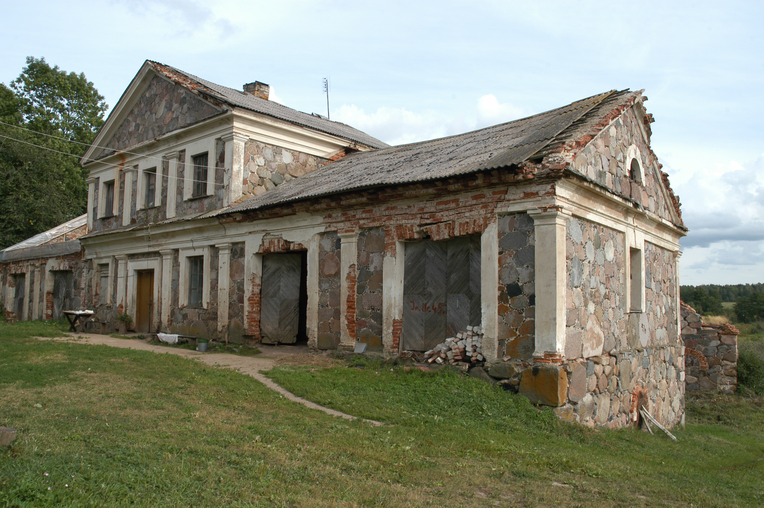 Paliesiaus dvaro arklidė